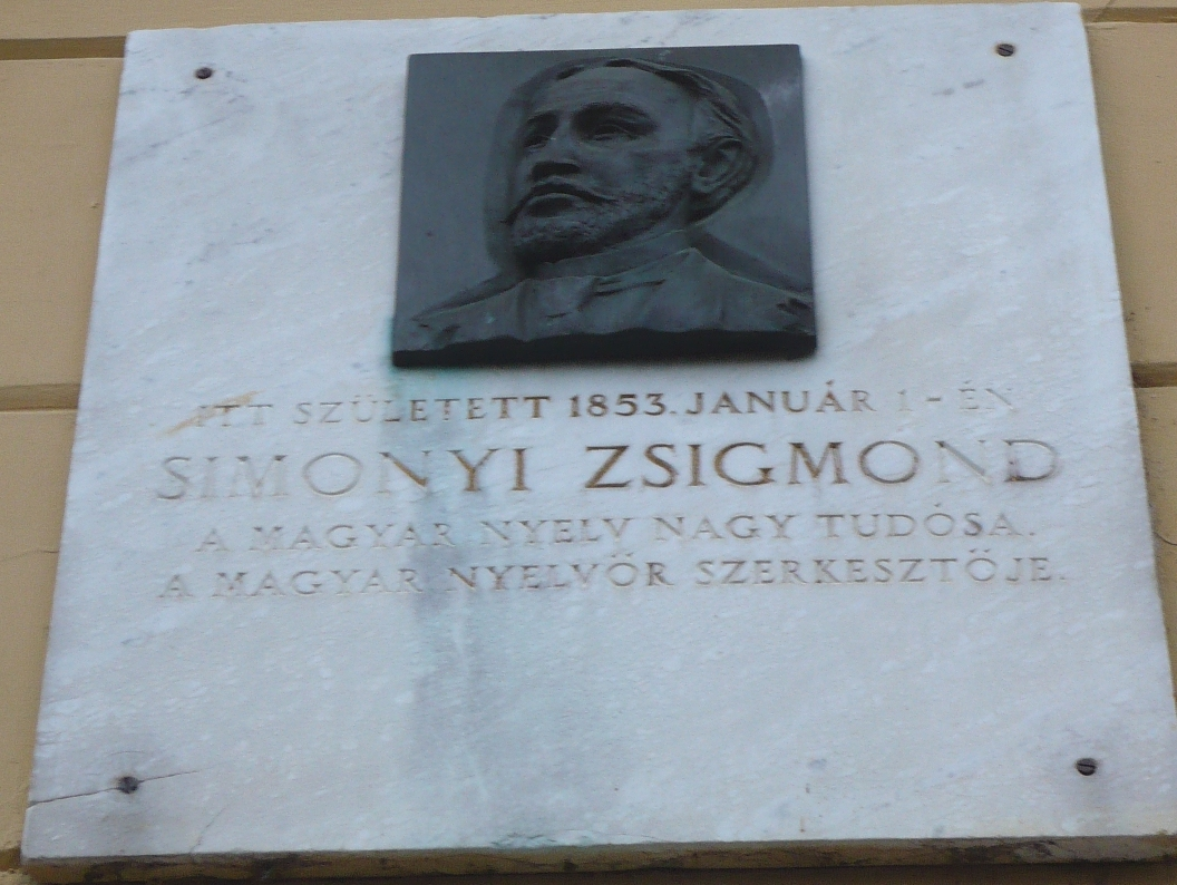 Simonyi Zsigmond emléktábla a veszprémi Kossuth utca 7. falán, az utcaszintről nézve. R. Kiss Lenke (Rábai Györgyné) alkotása, 1976.